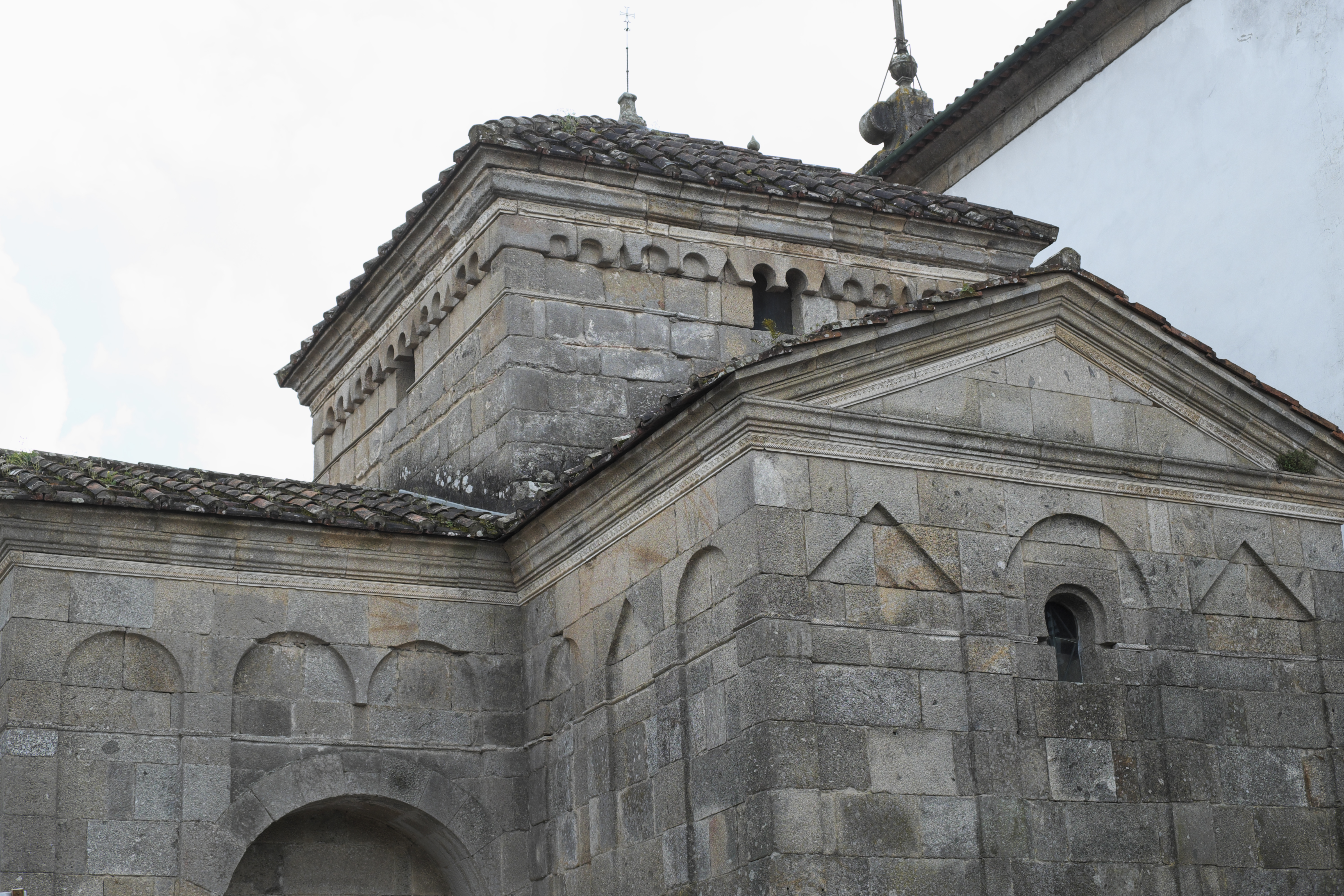 Westgotische Kirche São Frutuoso de Montélios in Real, einer Freguesia von Braga in der Região Norte (Portugal)